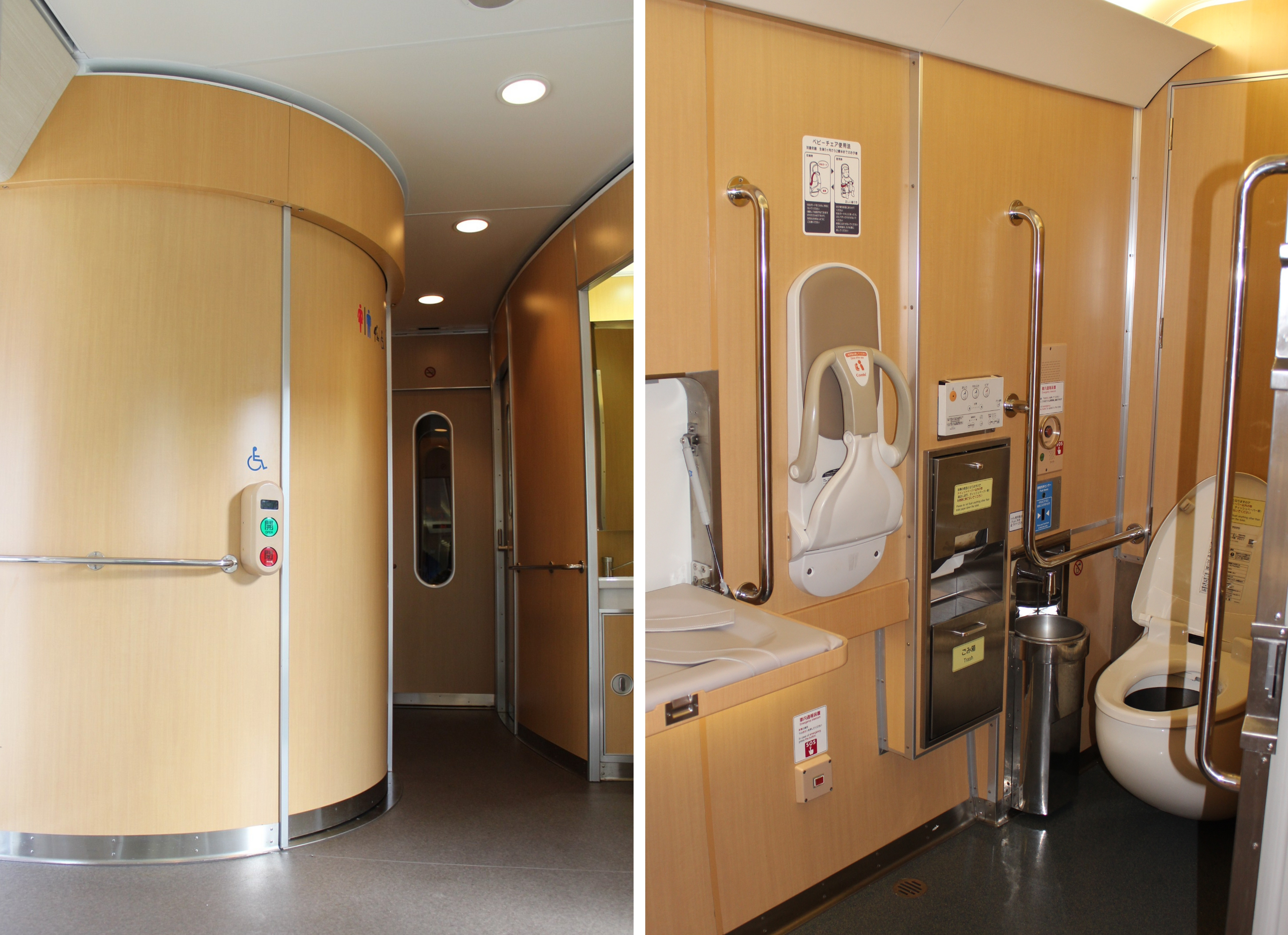 近鉄23000系多目的型トイレ